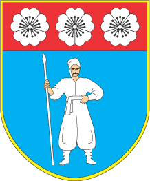 Герб Уманського району